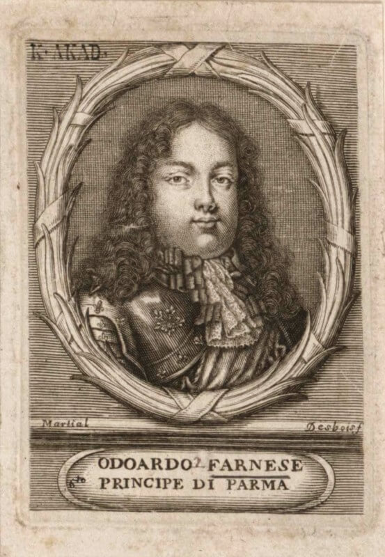 Portrait d'Édouard II Farnèse (1666-1693), prince héréditaire de Parme, en buste, de face, dans une bordure ovale. Un cartouche ovale dans la partie inférieure, où est marqué : Odoardo Farnese Principe di Parma.